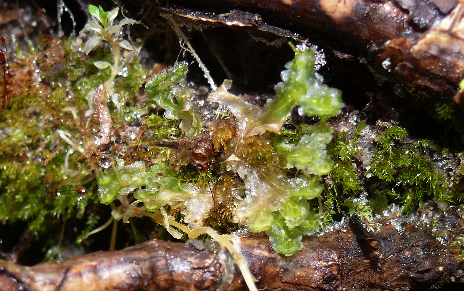 Blasia pusilla, Schwäbisch-Fränkische Waldberge, Germany